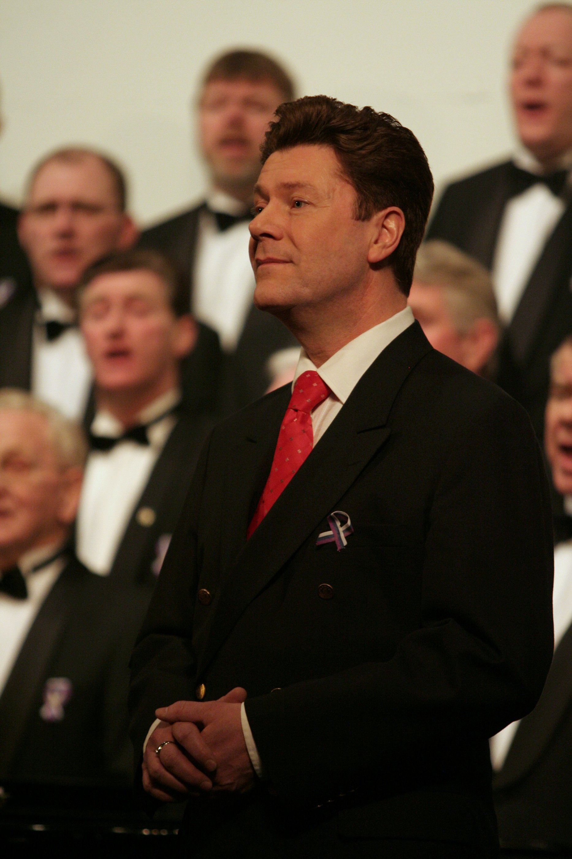 Bergþór Pálsson á Vorfagnaði karlakórsins Hreims í Ýdölum